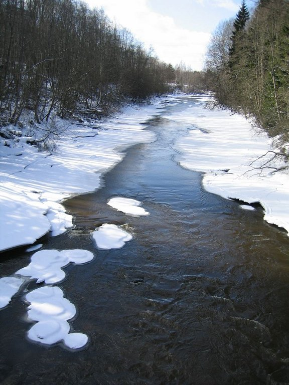 Pitkäkoski in Vantaanjoki river, between Helsinki and Vantaa, Finland. (In Finnish: Vantaanjoen Pitkäkoskea Helsingin ja Vantaan rajalla; kevätalvinen matalanveden näkymä)